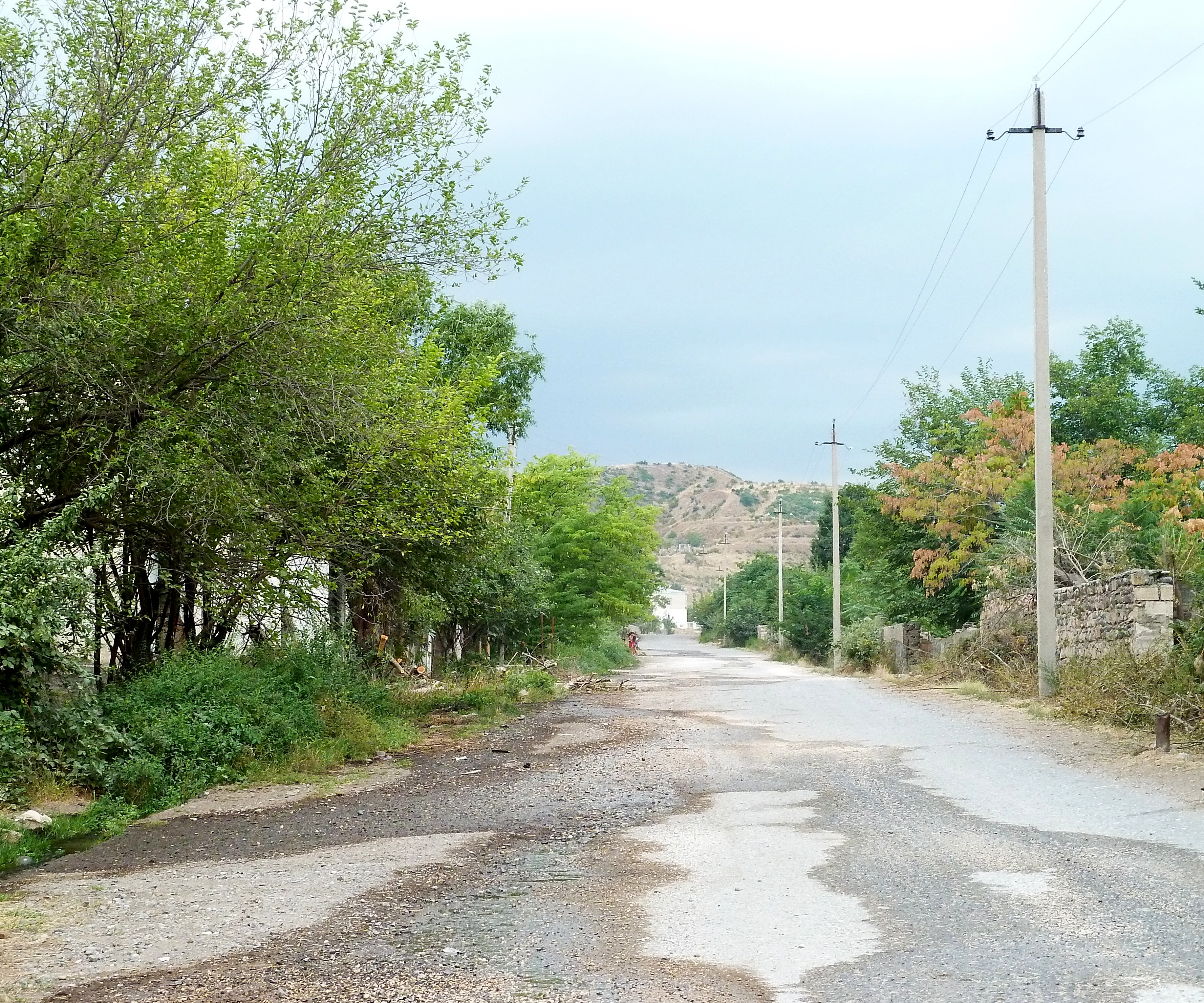 Ковсакан